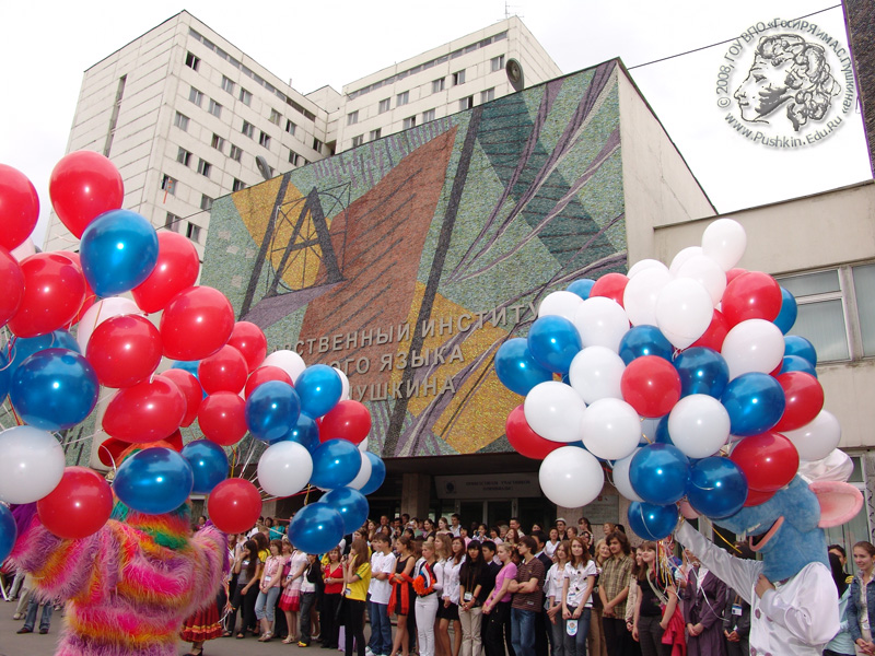 Международна олимпиада по руски език 2008